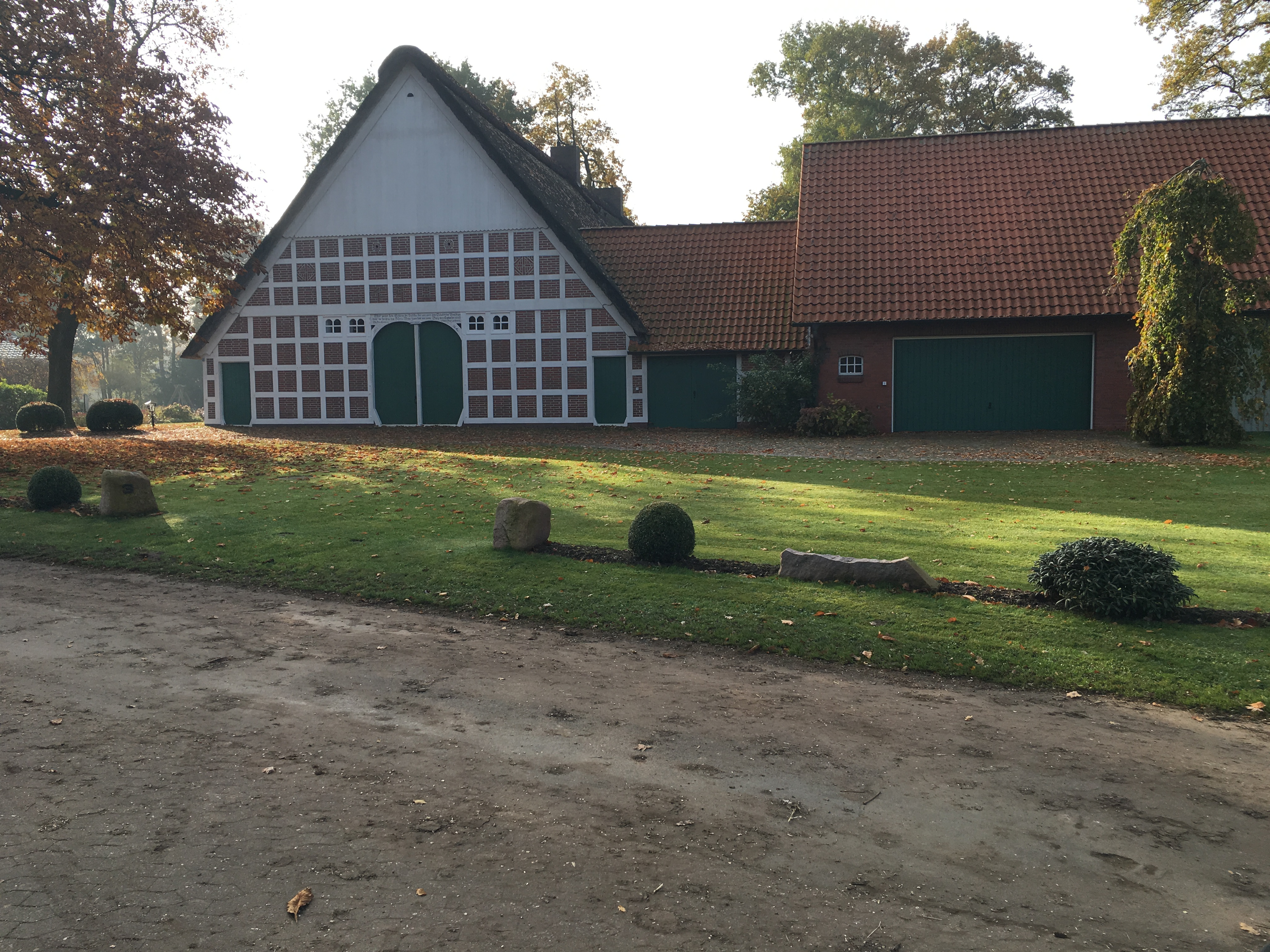 Ehmalig Buurnhuus in Burweg